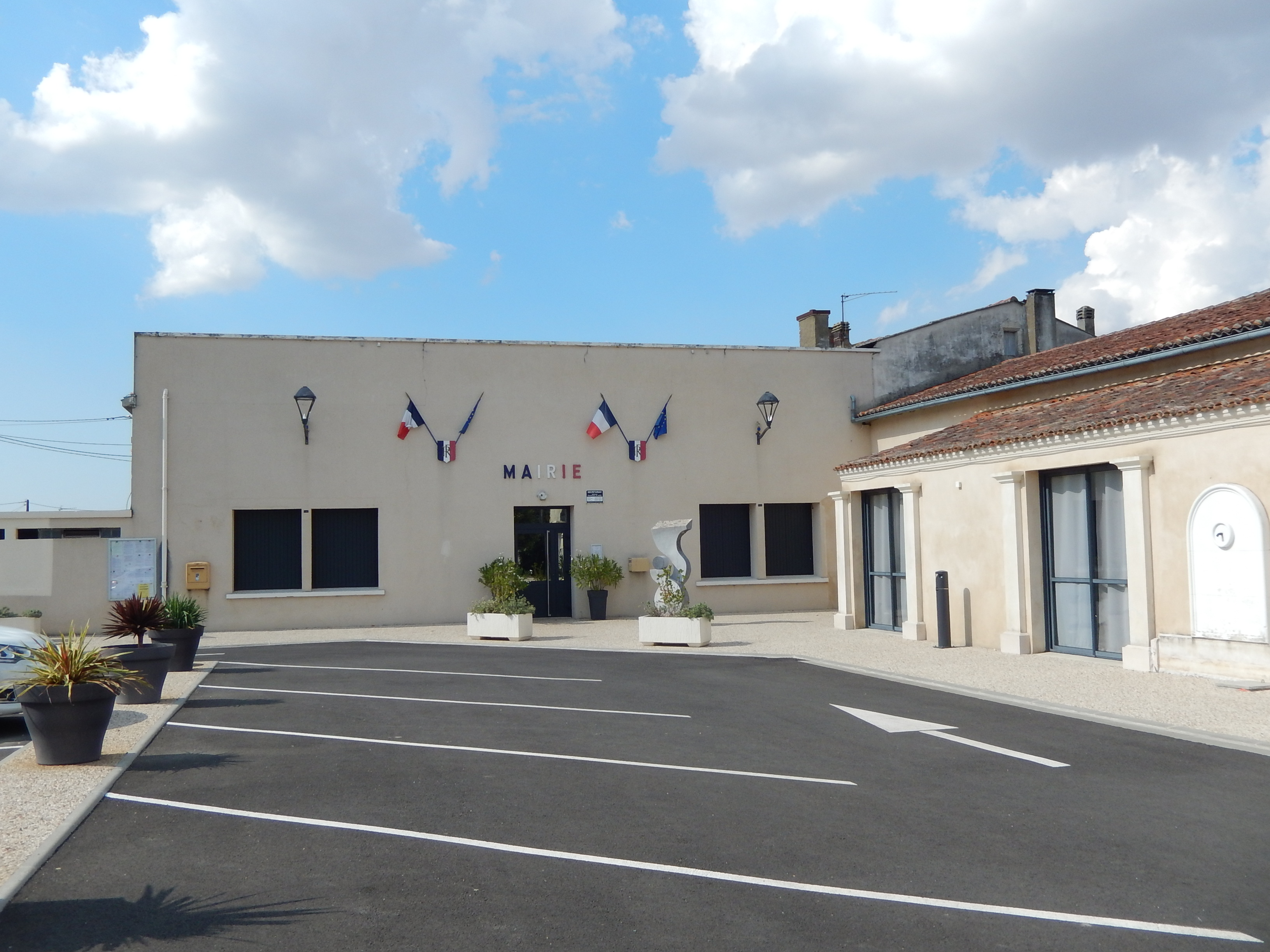 Le bâtiment qui abrite la mairie de la commune de Fontenet.